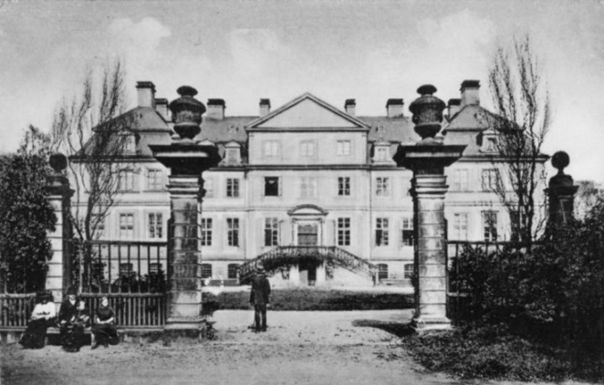 Schlossanlage der Herren v. Alten um 1912 in Hannover - Linden